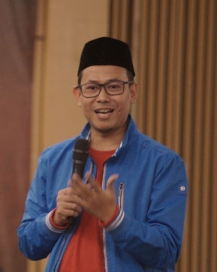 Pengusaha